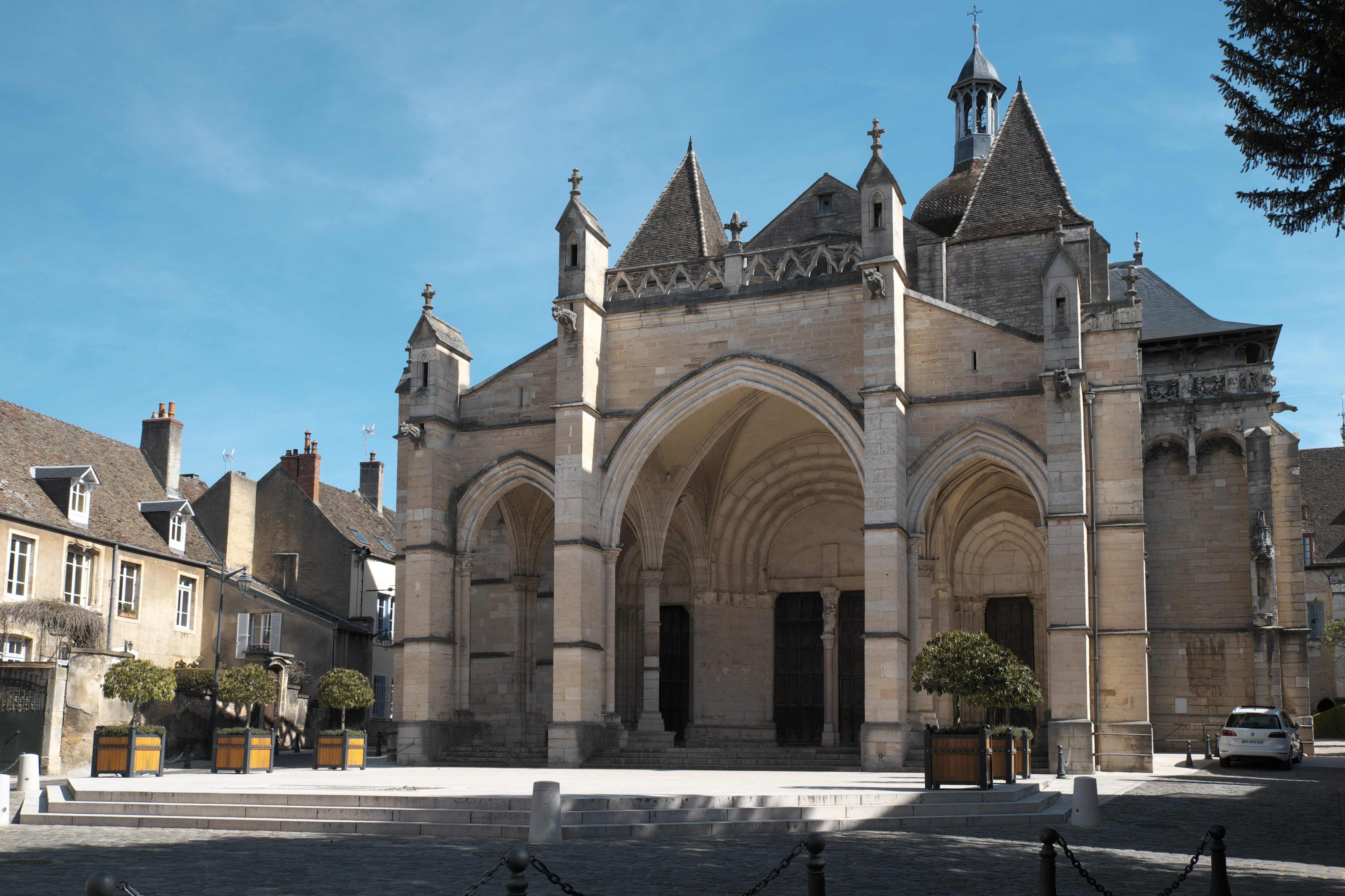 Katholische Pfarrkirche, ehemalige Stiftskirche, Notre-Dame in Beaune im Département Côte-d’Or (Bourgogne-Franche-Comté/Frankreich), Vorhalle